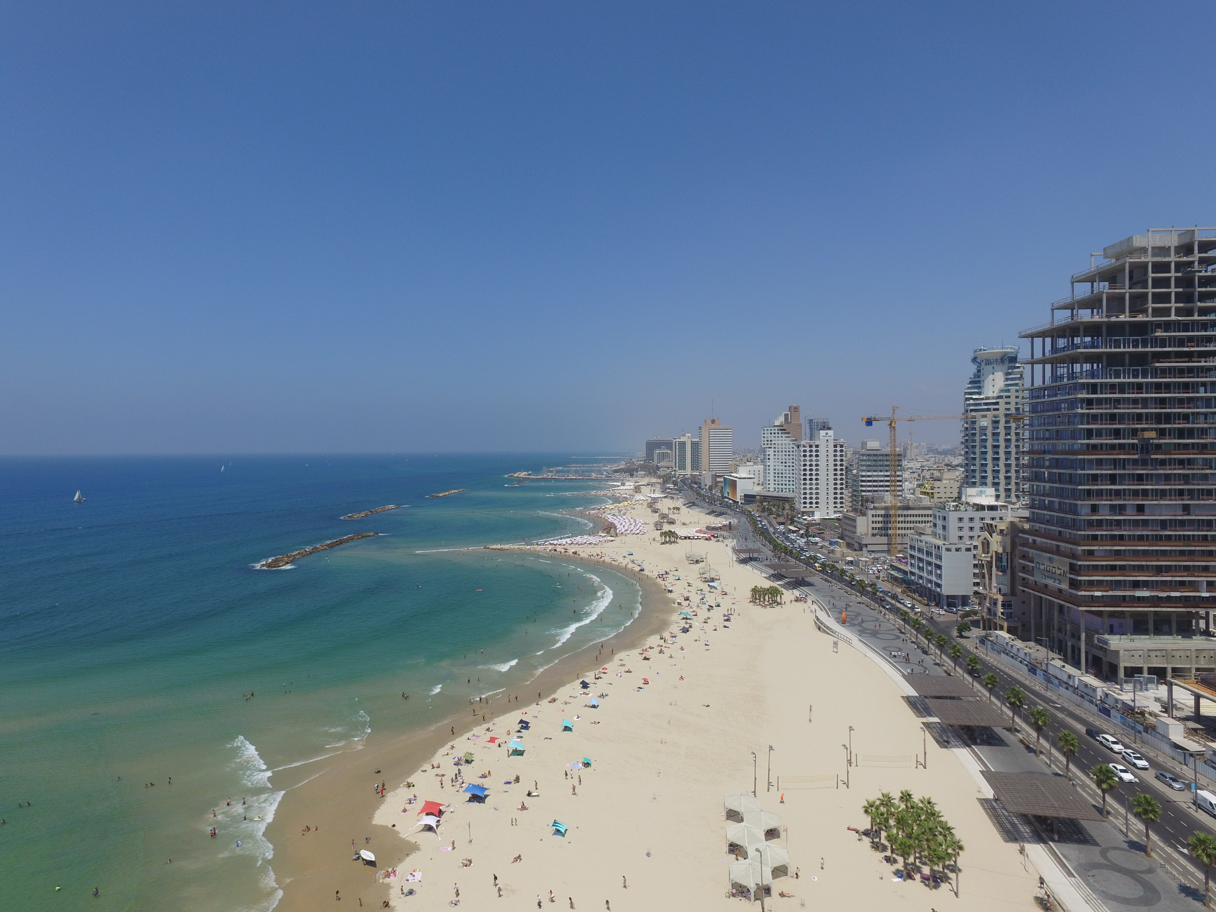 צילום של רחפן של חוף תל אביב